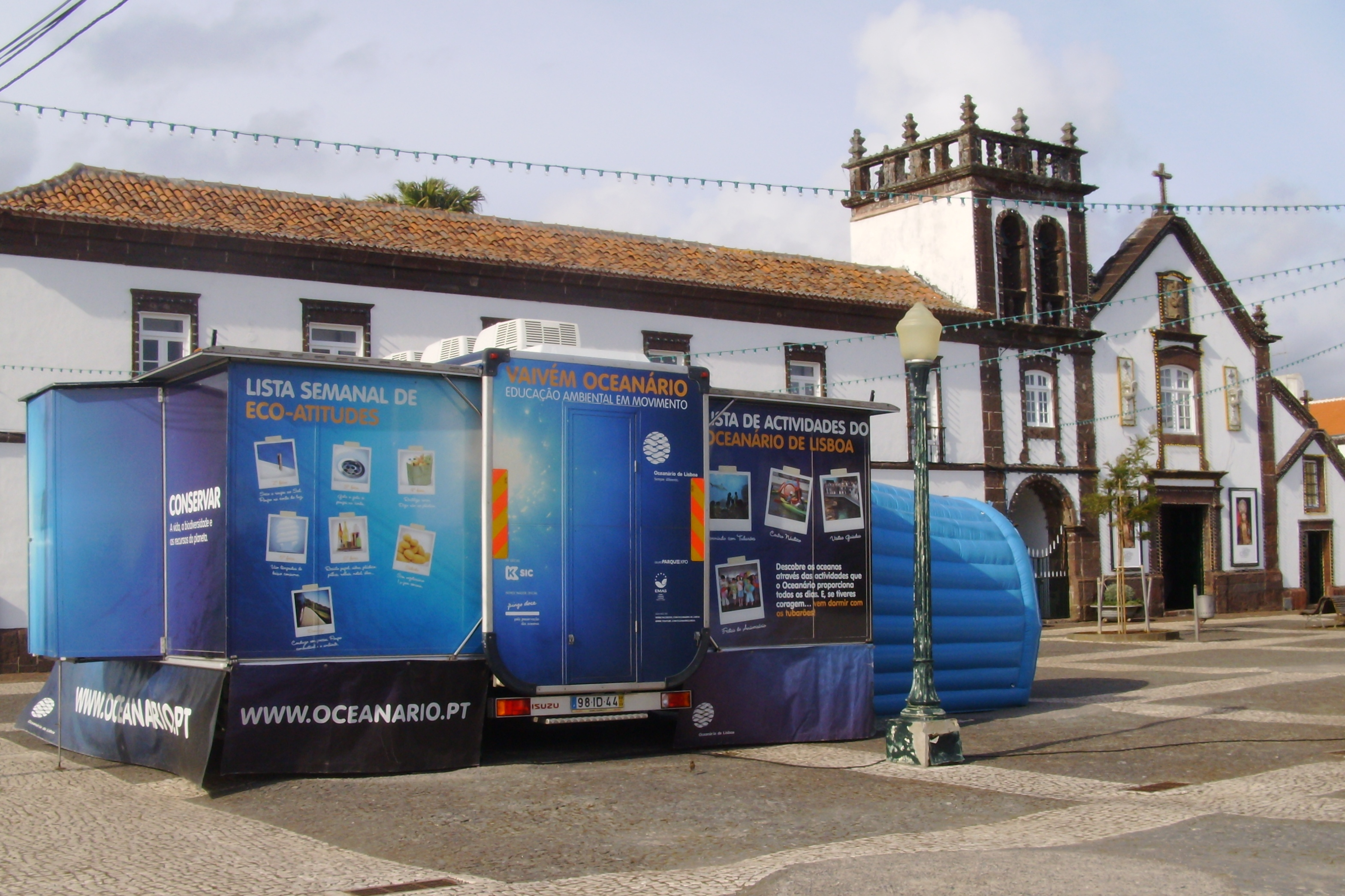 Vaivém Oceanário, do Oceanário de Lisboa, em Vila do Porto, ilha de Santa Maria, Açores.